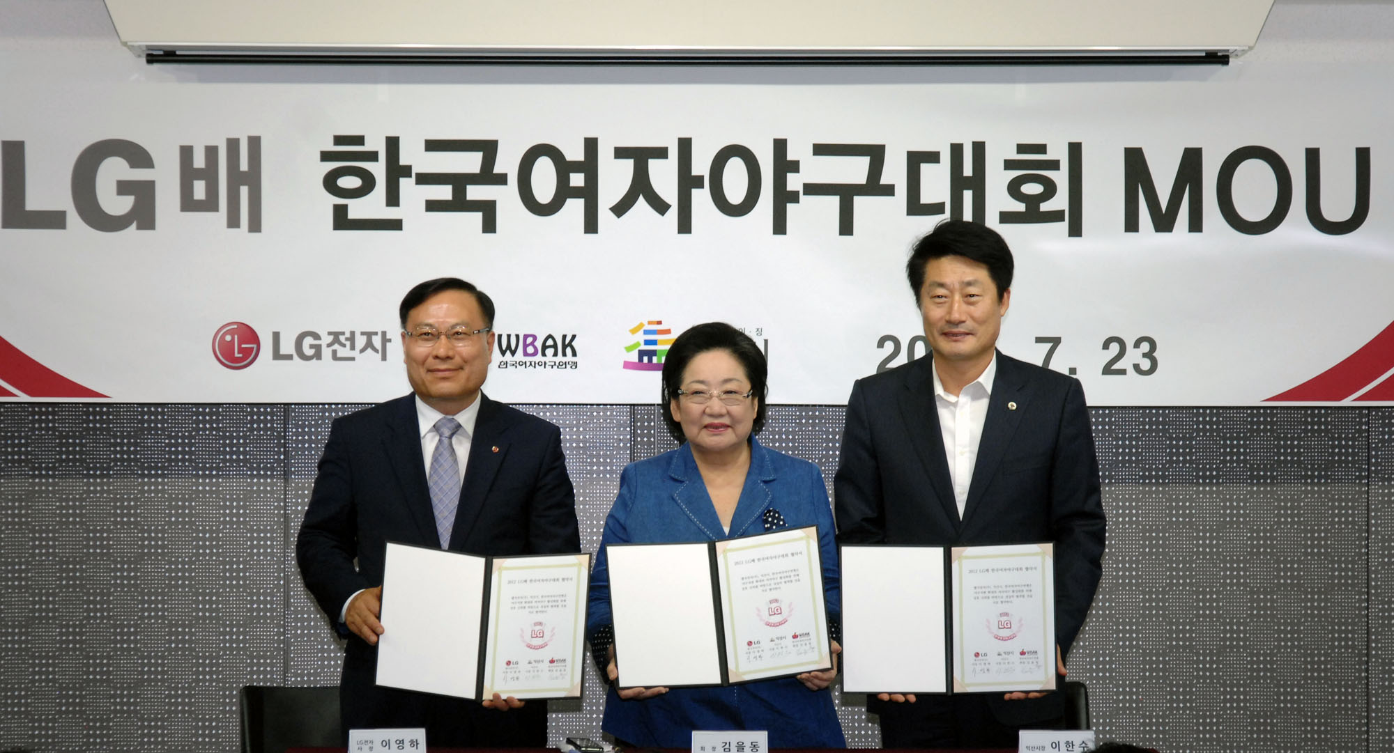 한국여자야구연맹 김을동 회장, 이한수 익산시장, lg전자 경영지원부문장 이영하 사장은 23일 오후 서울 도곡동 야구회관에서 ‘Lg배 한국여자야구대회’ 개최를 위한 Mou를 체결했다.